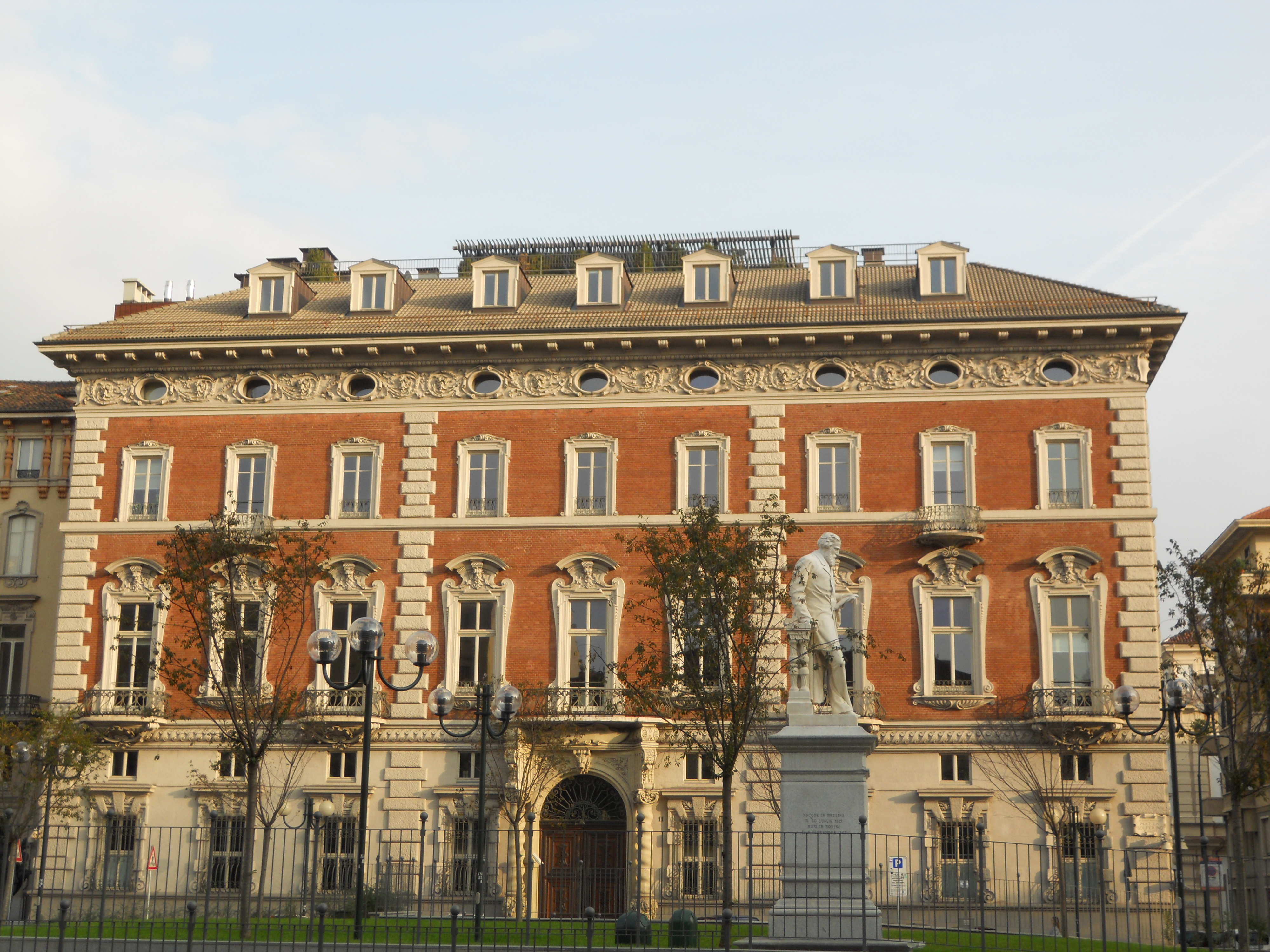 Palazzo Ceriana